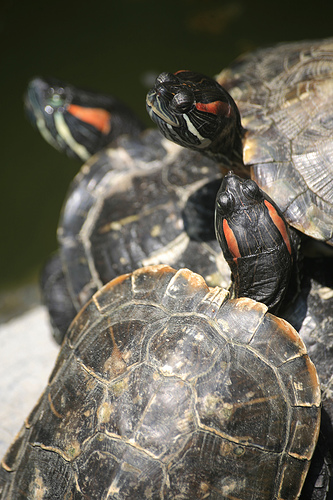 Red-eared sliders